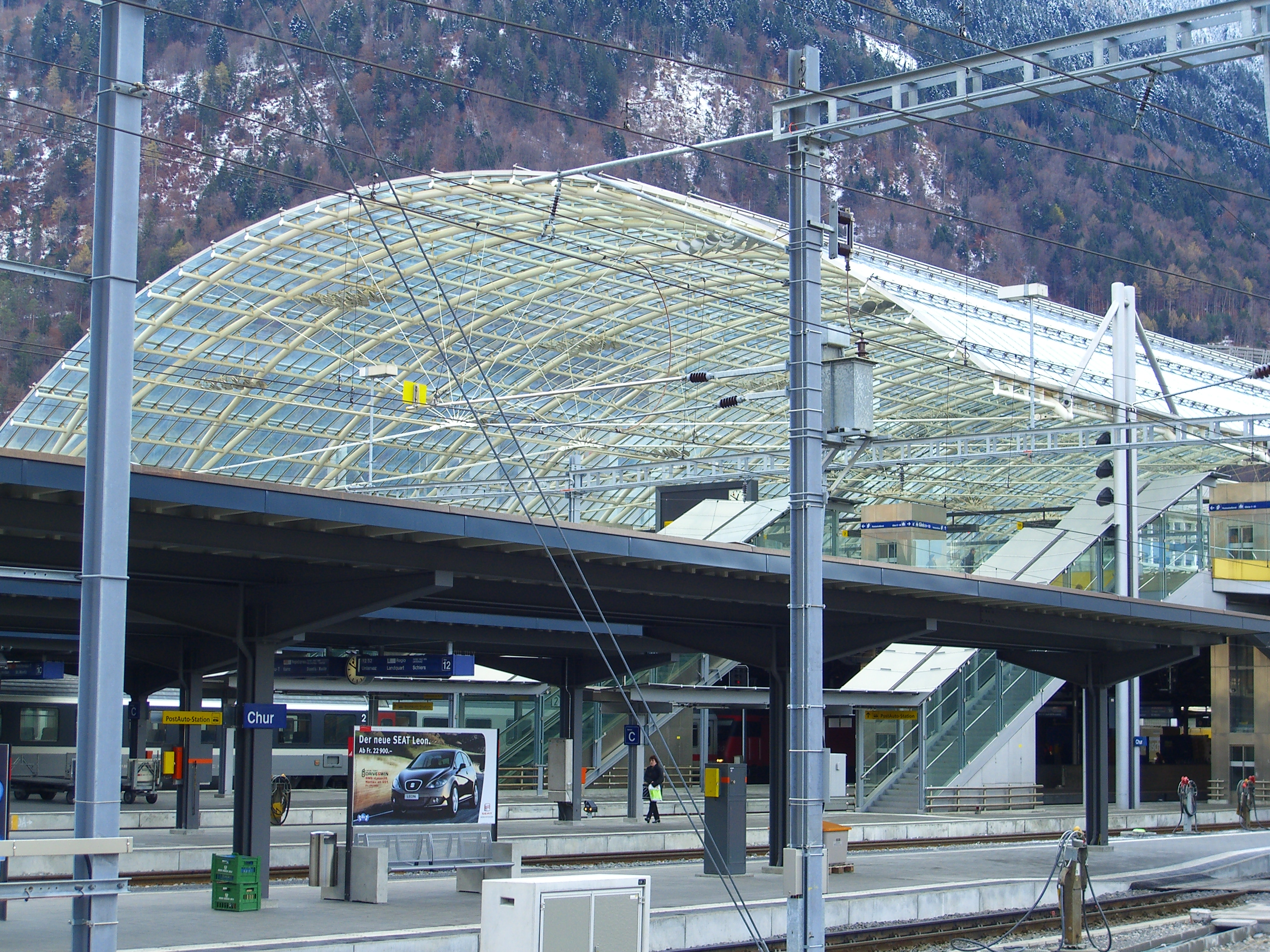 Postautostation über dem Bahnhof in Chur. Quelle:Bravuogn. Autor:Bravuogn